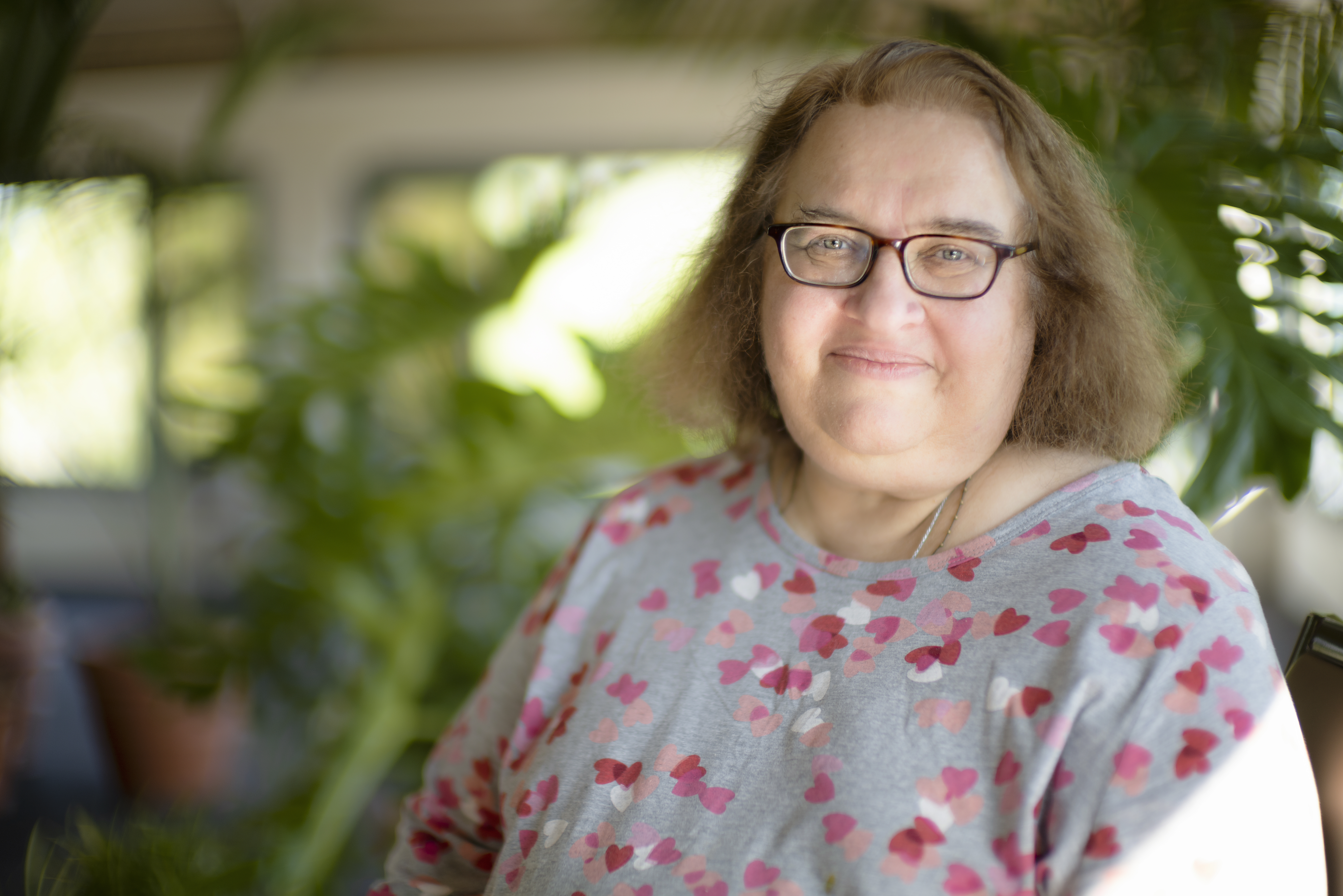 Sharon Salzberg in 2020.